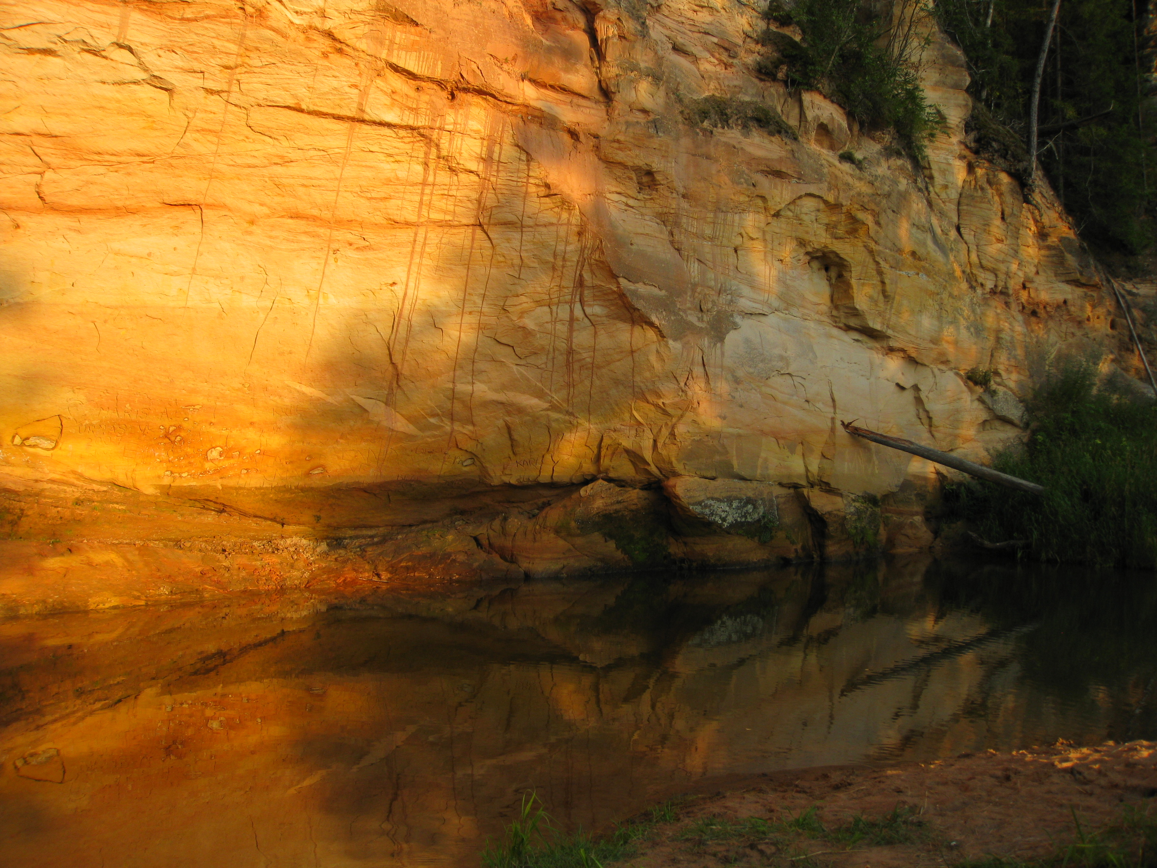 Härma mäemimine müür Piusa jõe ääres, Piusa MKA